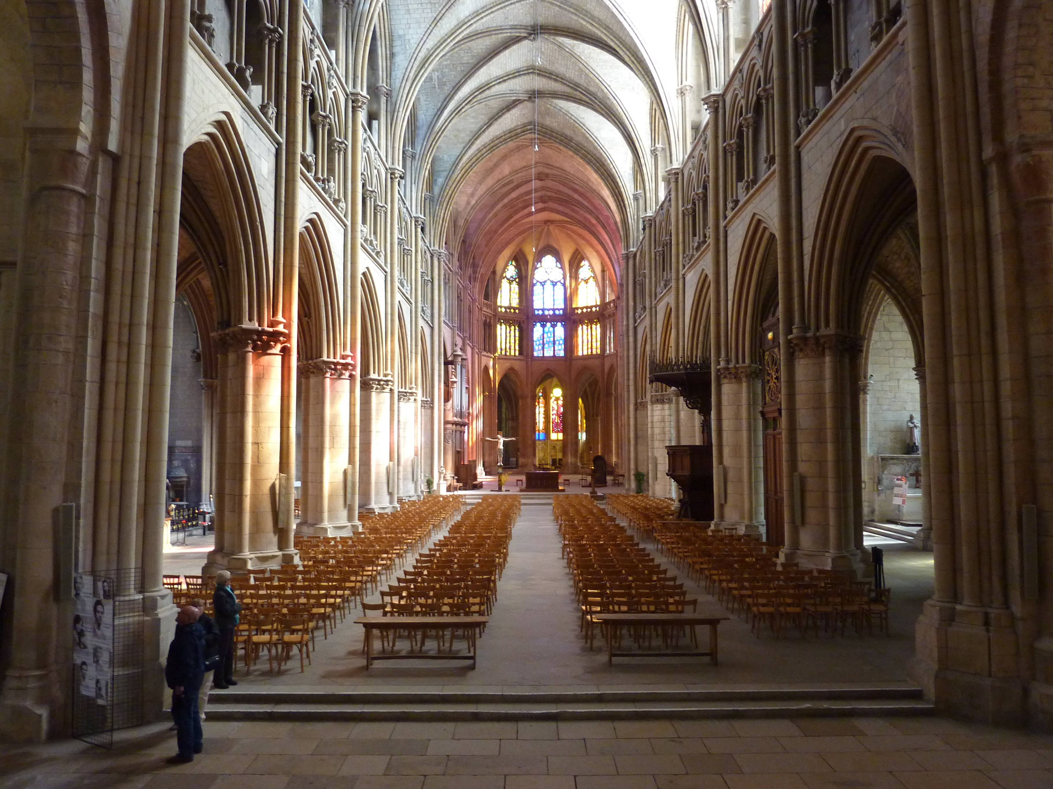 Nevers : vue intérieure d'ensemble de la cathédrale Saint-Cyr-et-Sainte-Julitte